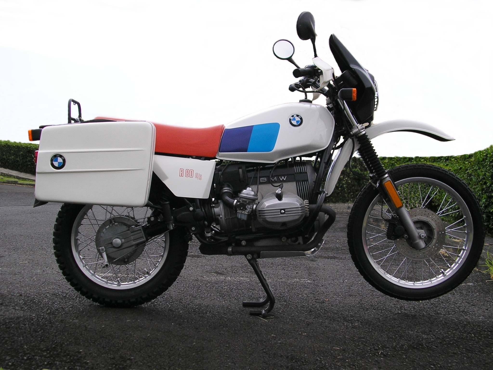 BMW R80 G/S de 1981 d'origine avec sa seule valise droite (La seule proposée en option à l'époque)